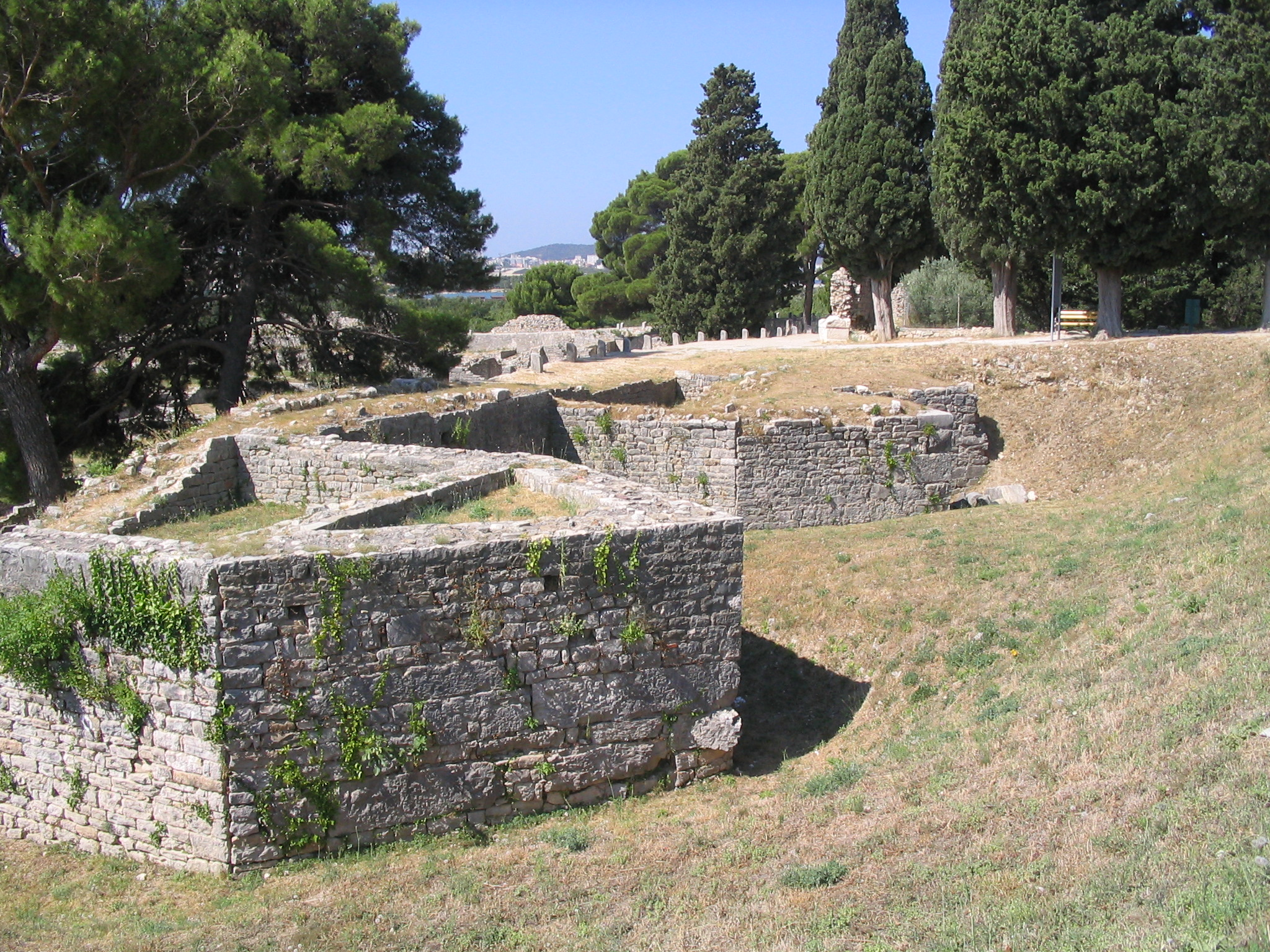 Murailles de la cité antique de Salona (actuelle Solin) à proximité de Split (Croatie)